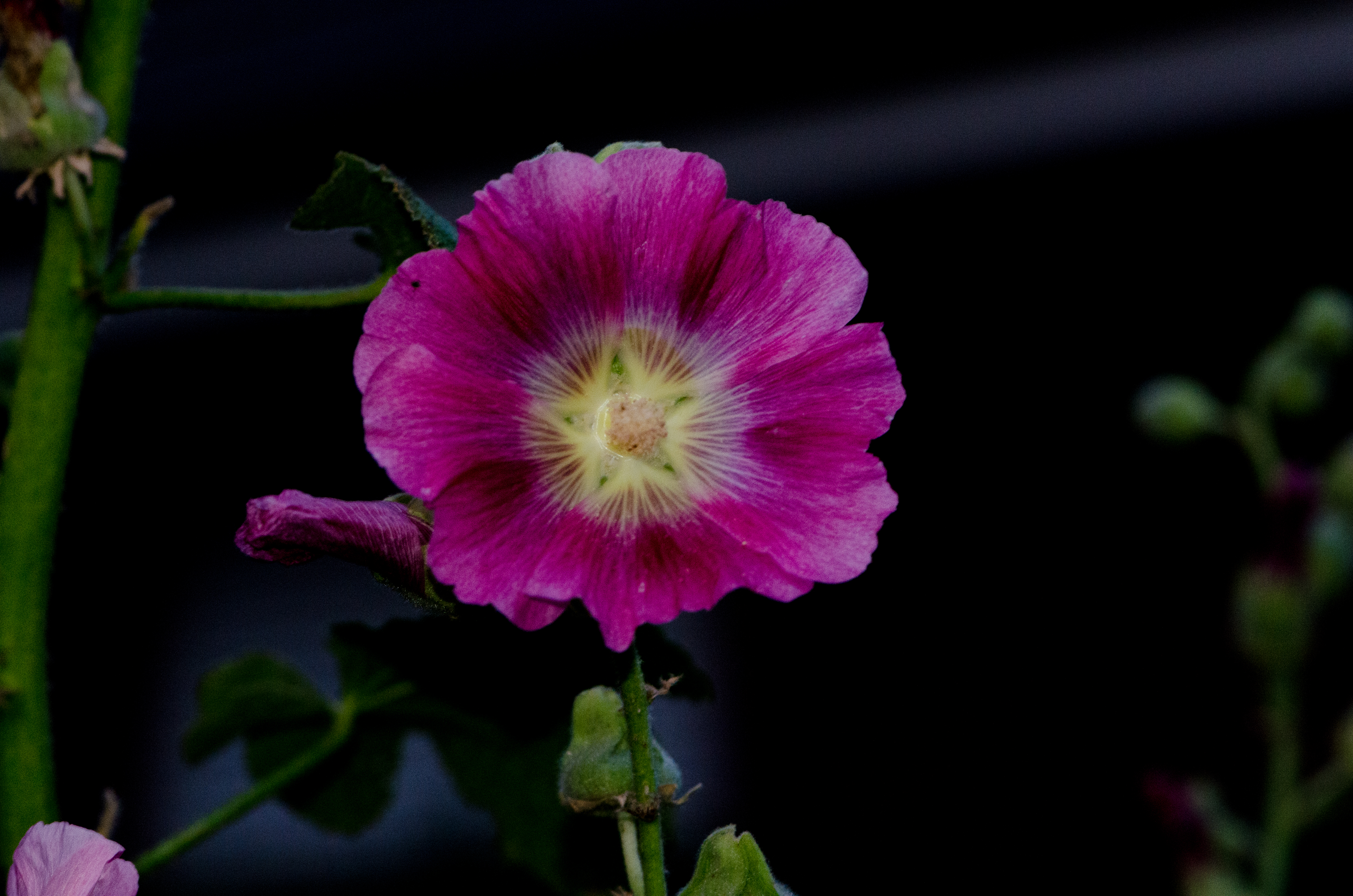 Blüte einer Stockrose mit hervorgehobenem Stern in der Mitte